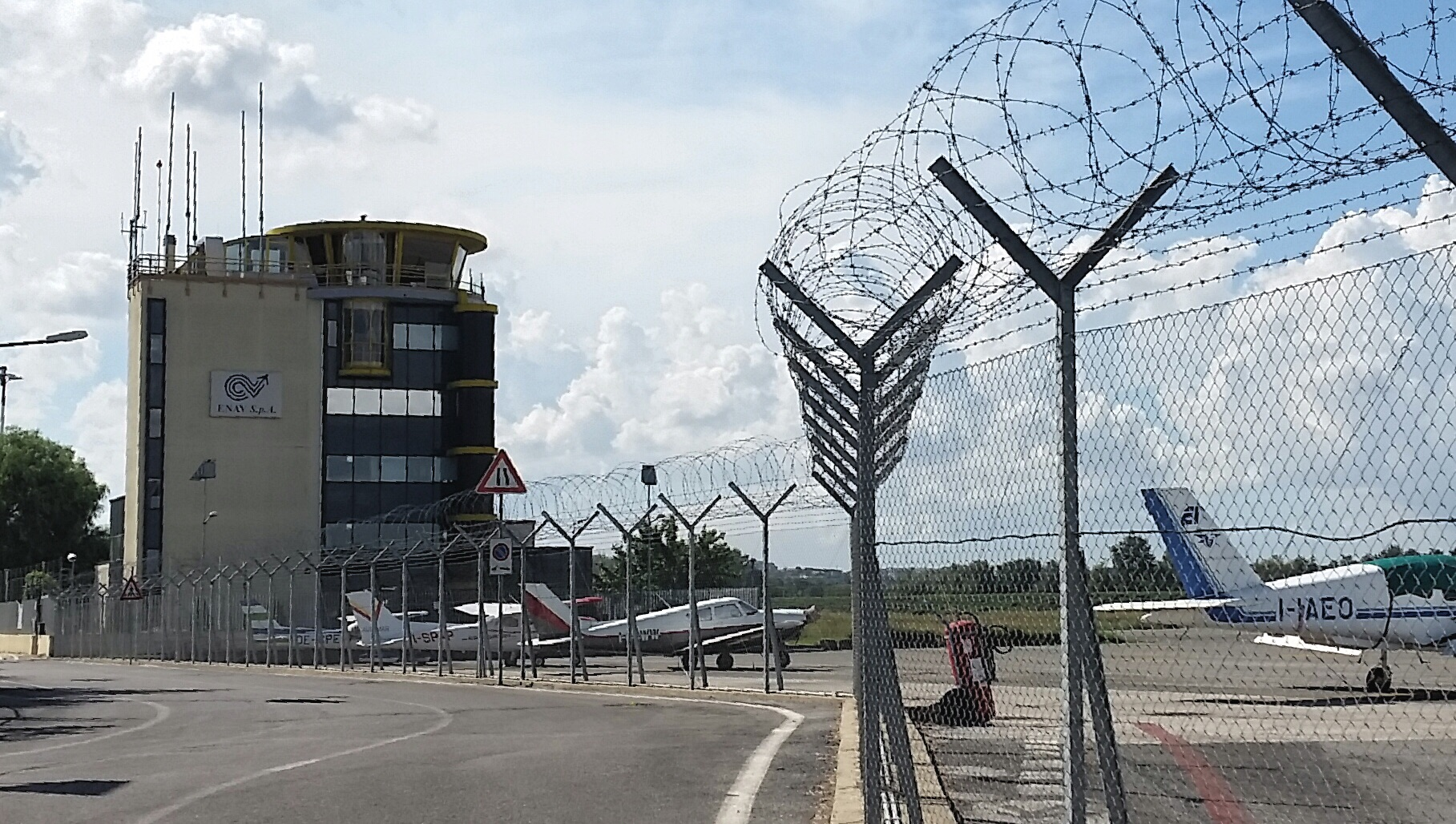 Torre di controllo ENAVdell'Aeroporto Roma-Urbe